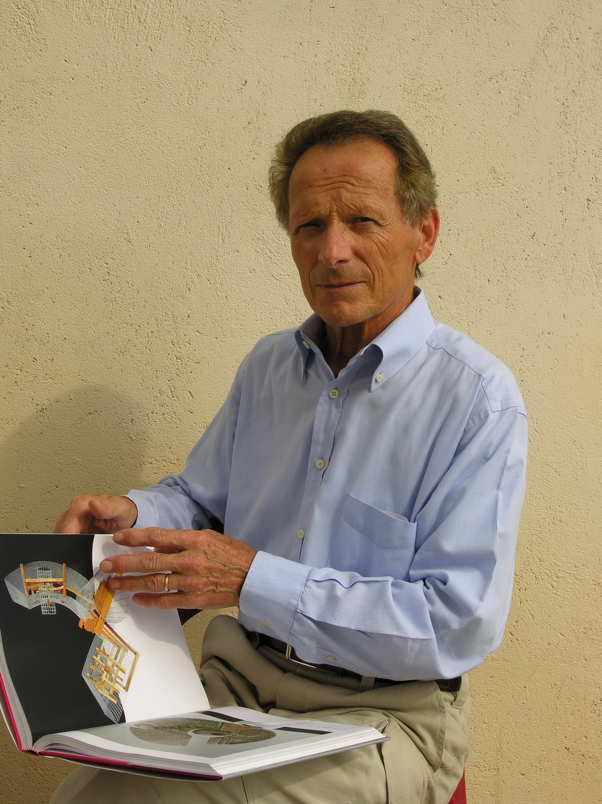 Amedeo Fiorese